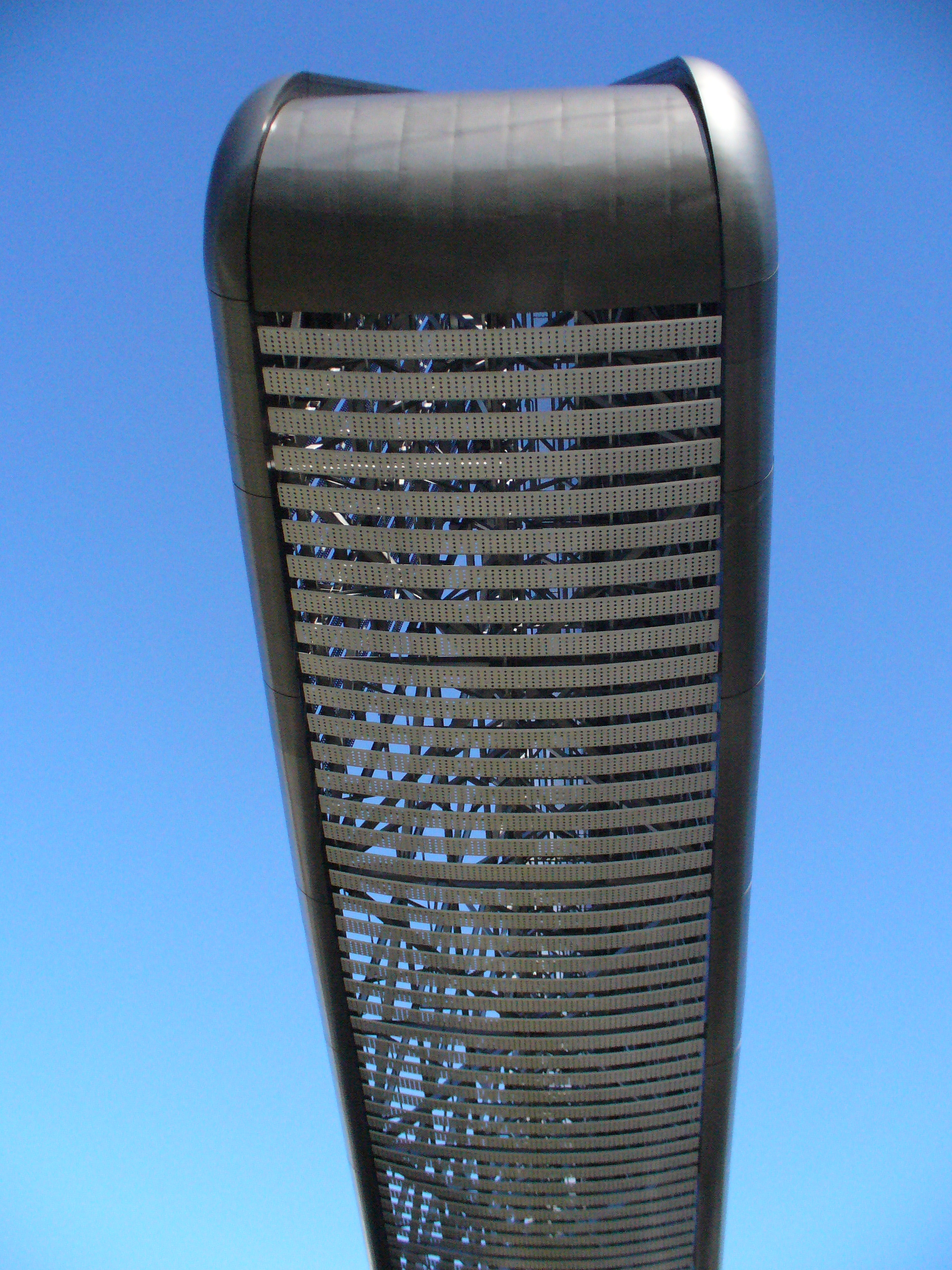 Solar Ark（ソーラーアーク）,Anpachi, Gifu, Japan（岐阜県安八郡安八町）で撮影。